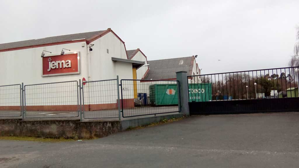 JEMA en Catabois, Ferrol.